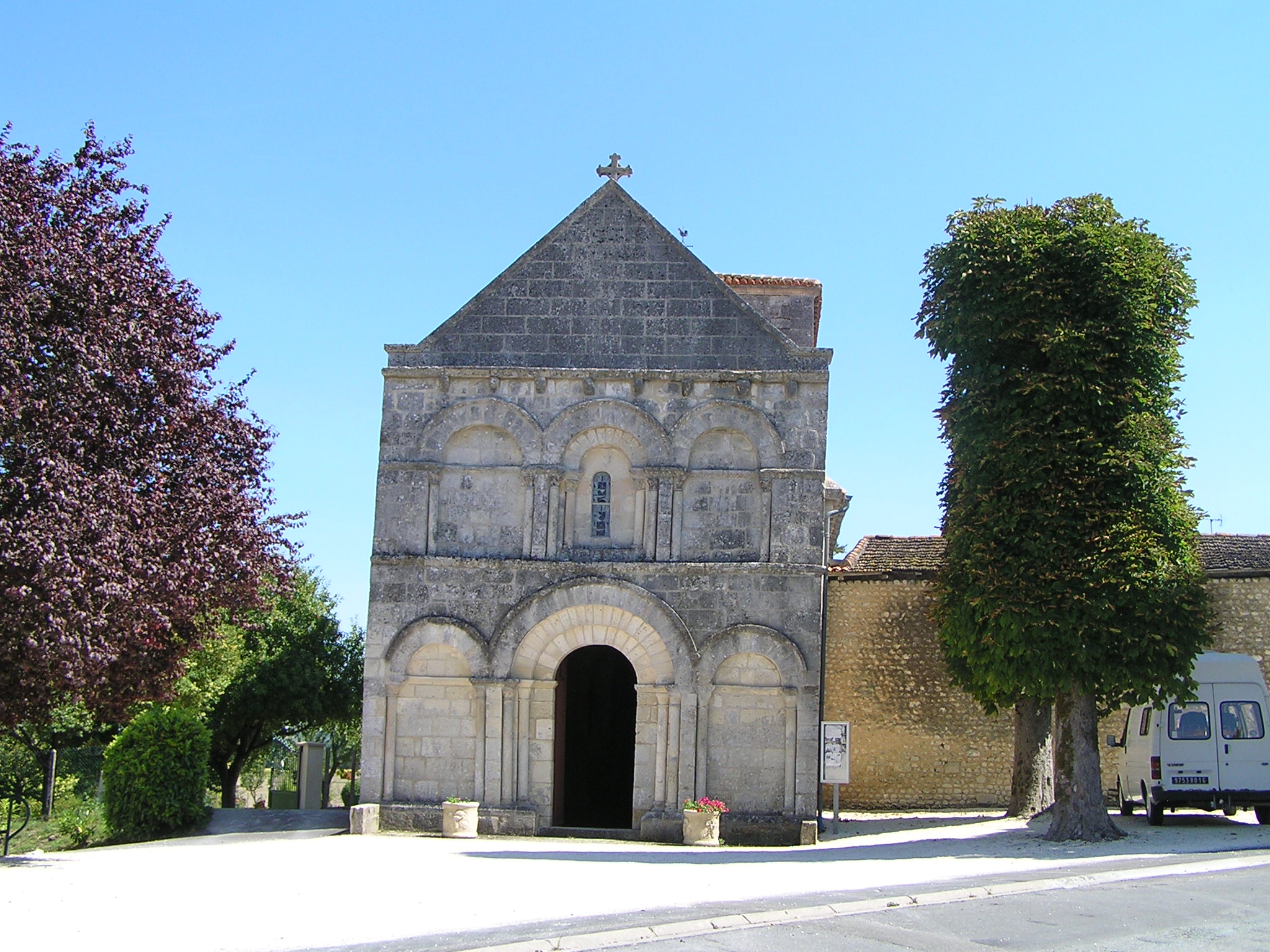 église de Champagne-Vigny, Charente, France